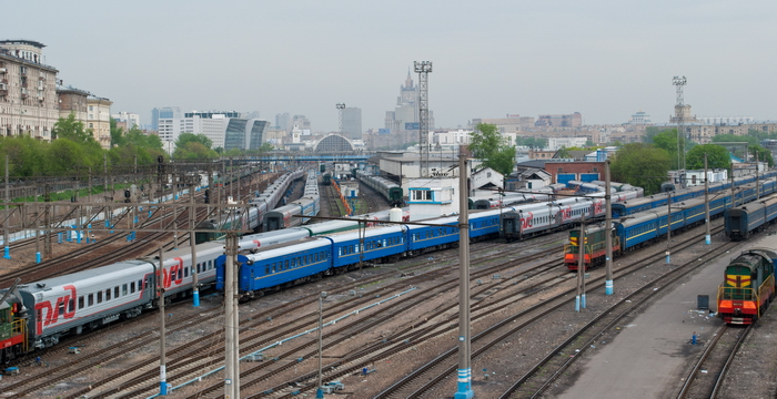 2011, май